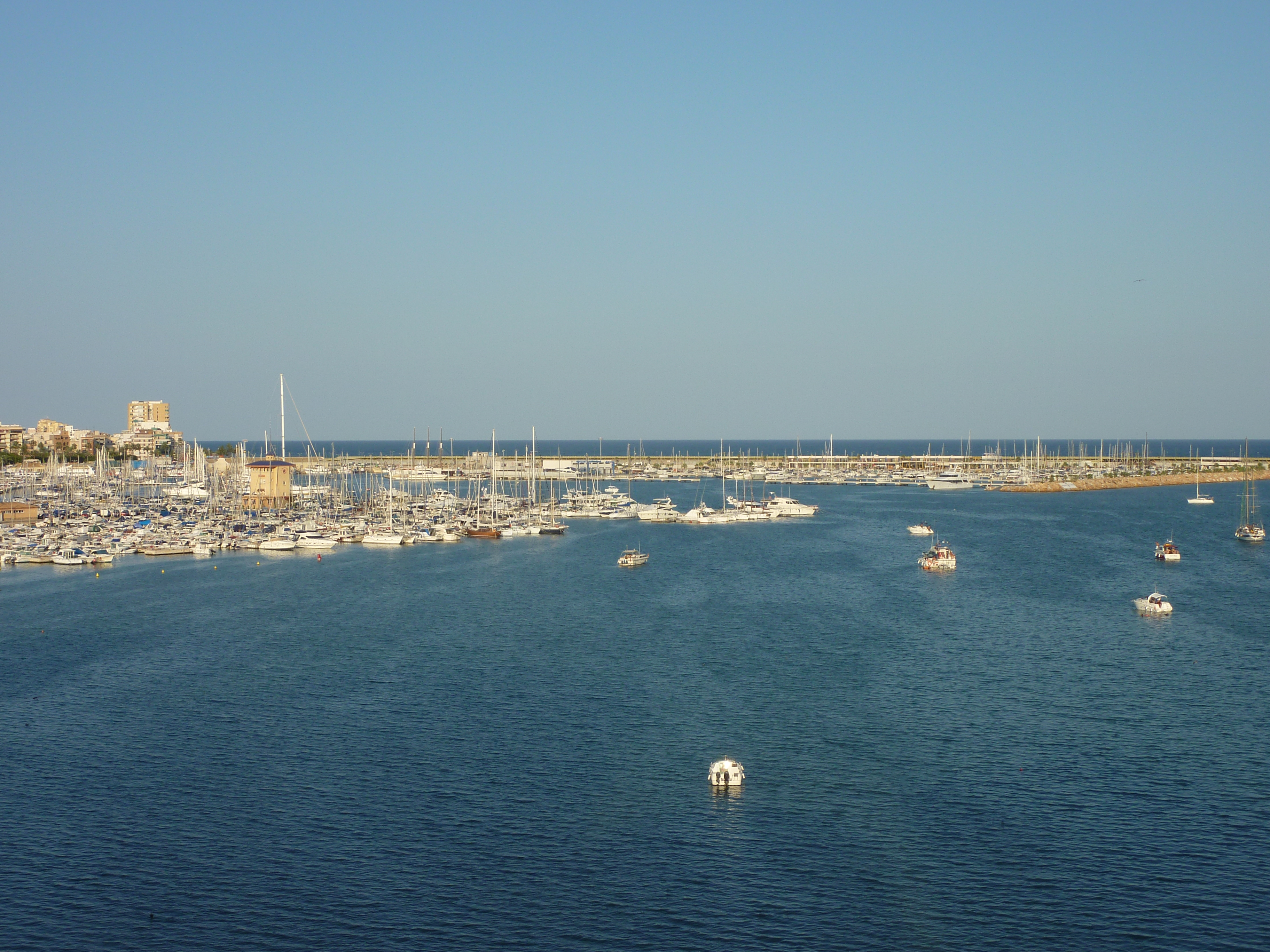 Real Club Naútico de Torrevieja, uno de los clubes más importantes de la zona de Alicante.